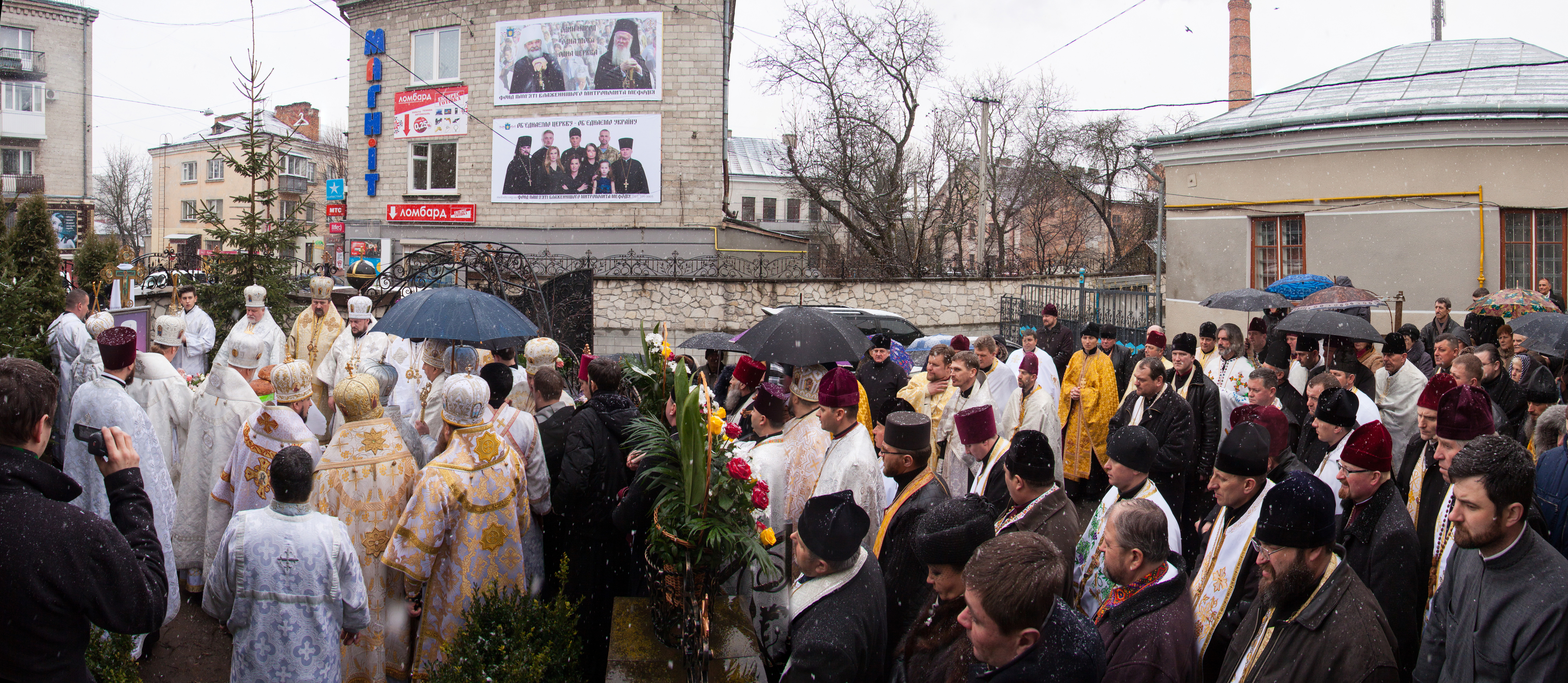 Церква Різдва Христового, Тернопіль.